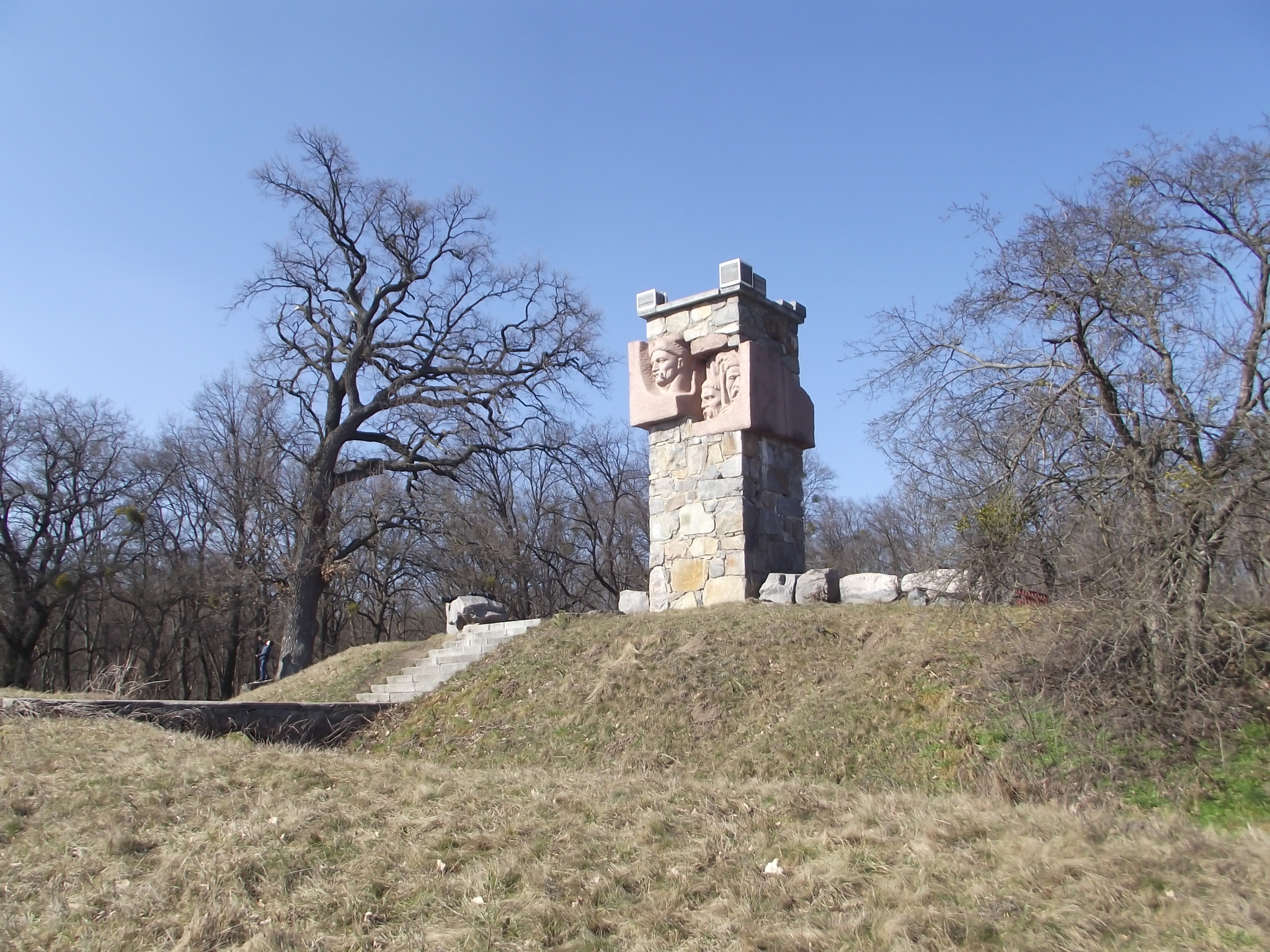 Пам'ятник на честь визволення міста Біла Церква в 1702 році козаками під проводом козацького отамана Семена Палія, Біла Церква, «Палієва гора» (на території Дендропарку «Олександрія»)